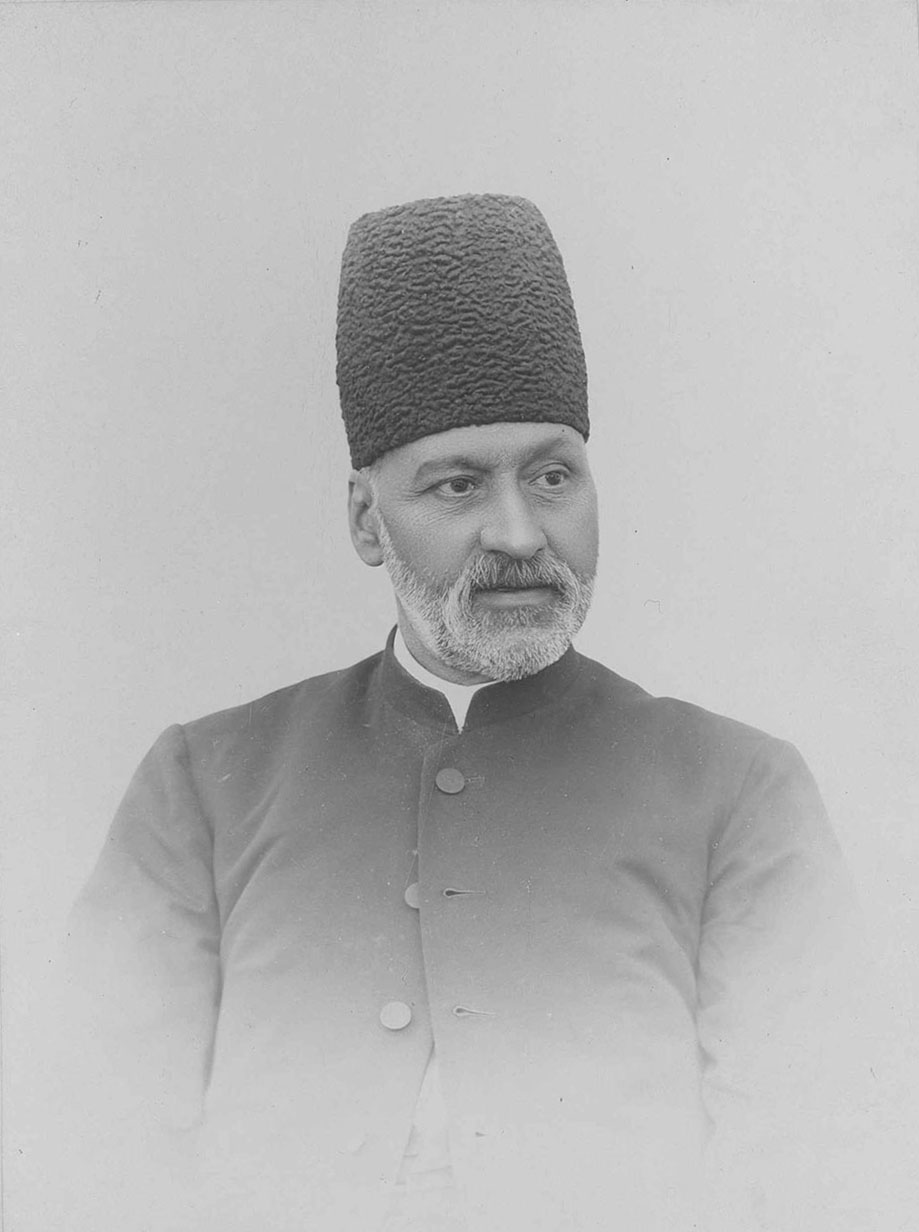 نصرالله مشیرالدوله اولین نخست وزیر ایران